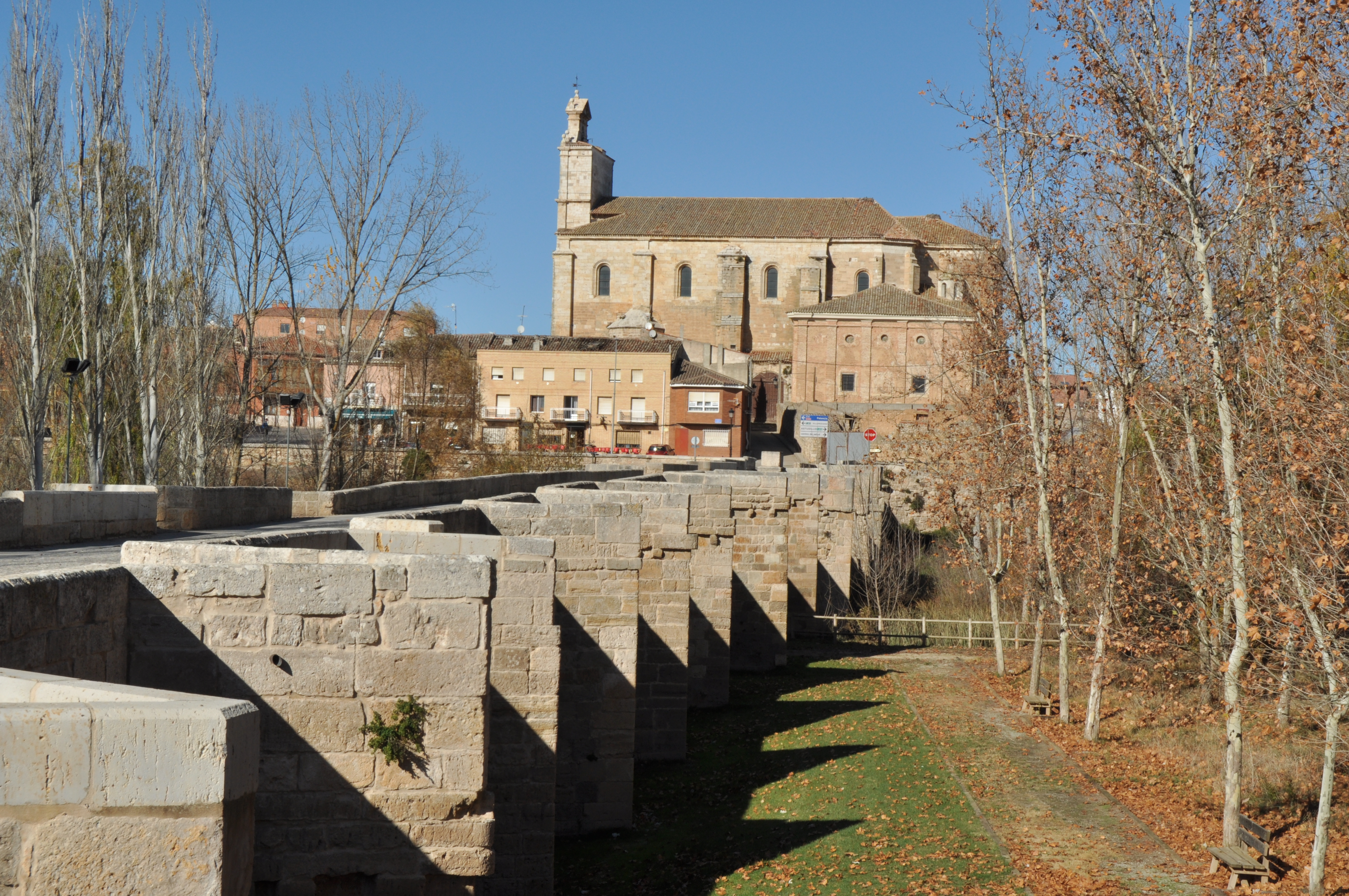 Torquemada - 011